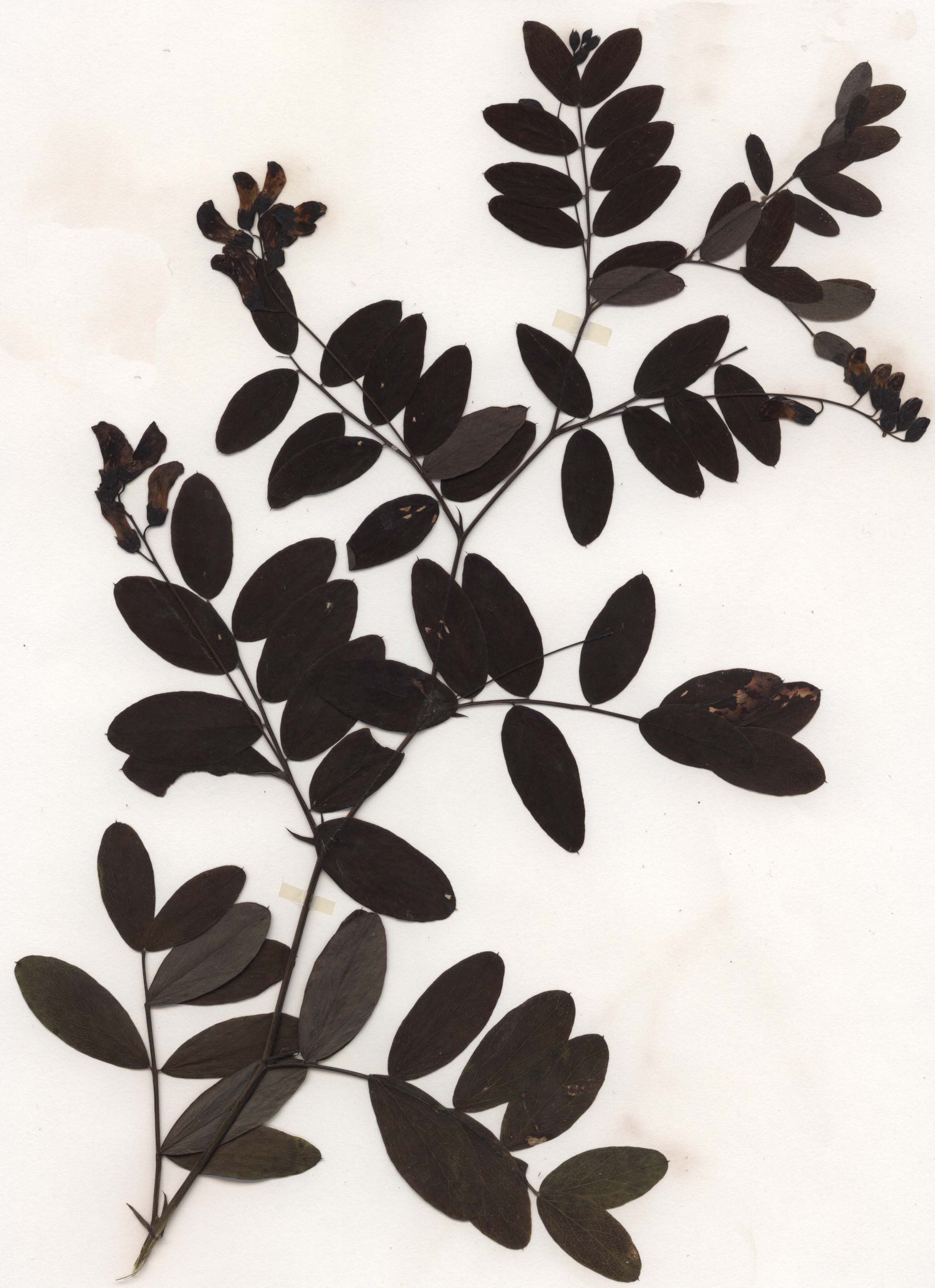 Lathyrus niger, eigener Herbarbeleg